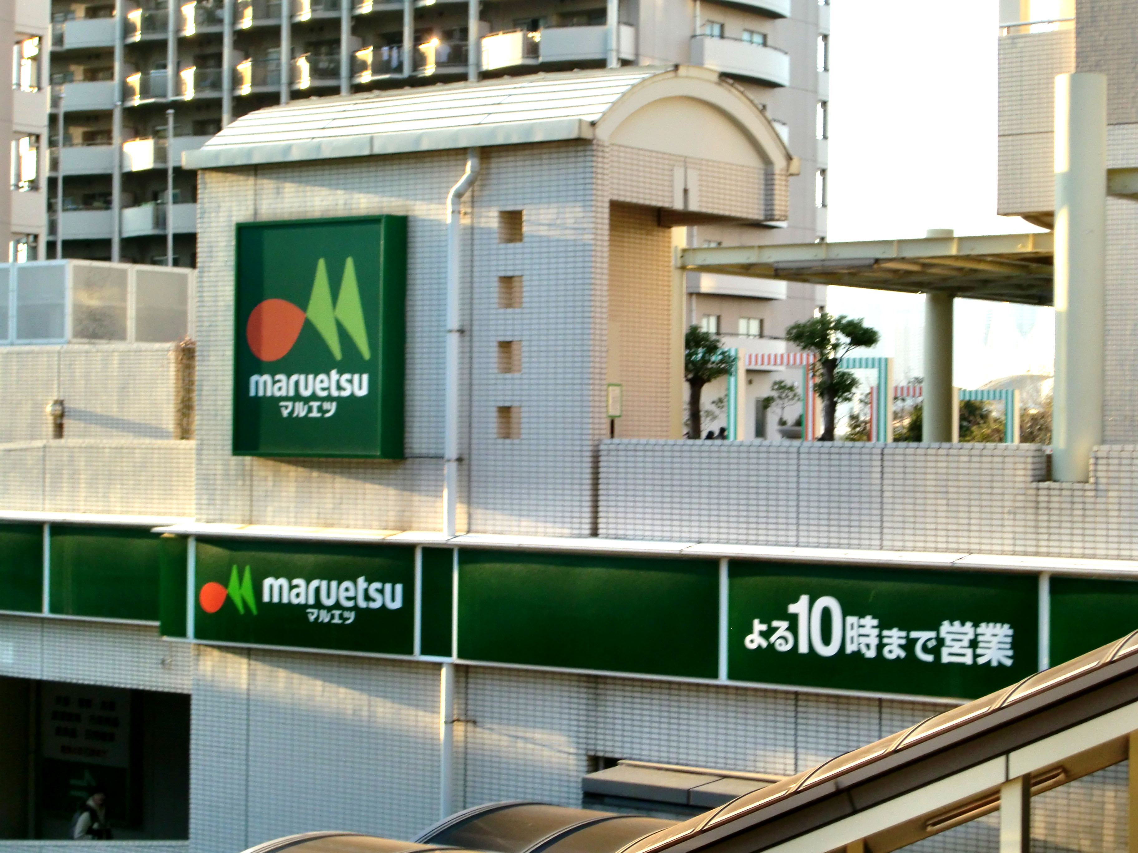 Maruetsu Odaiba,1-5-3 Daiba Minato-ku Tokyo JAPAN.